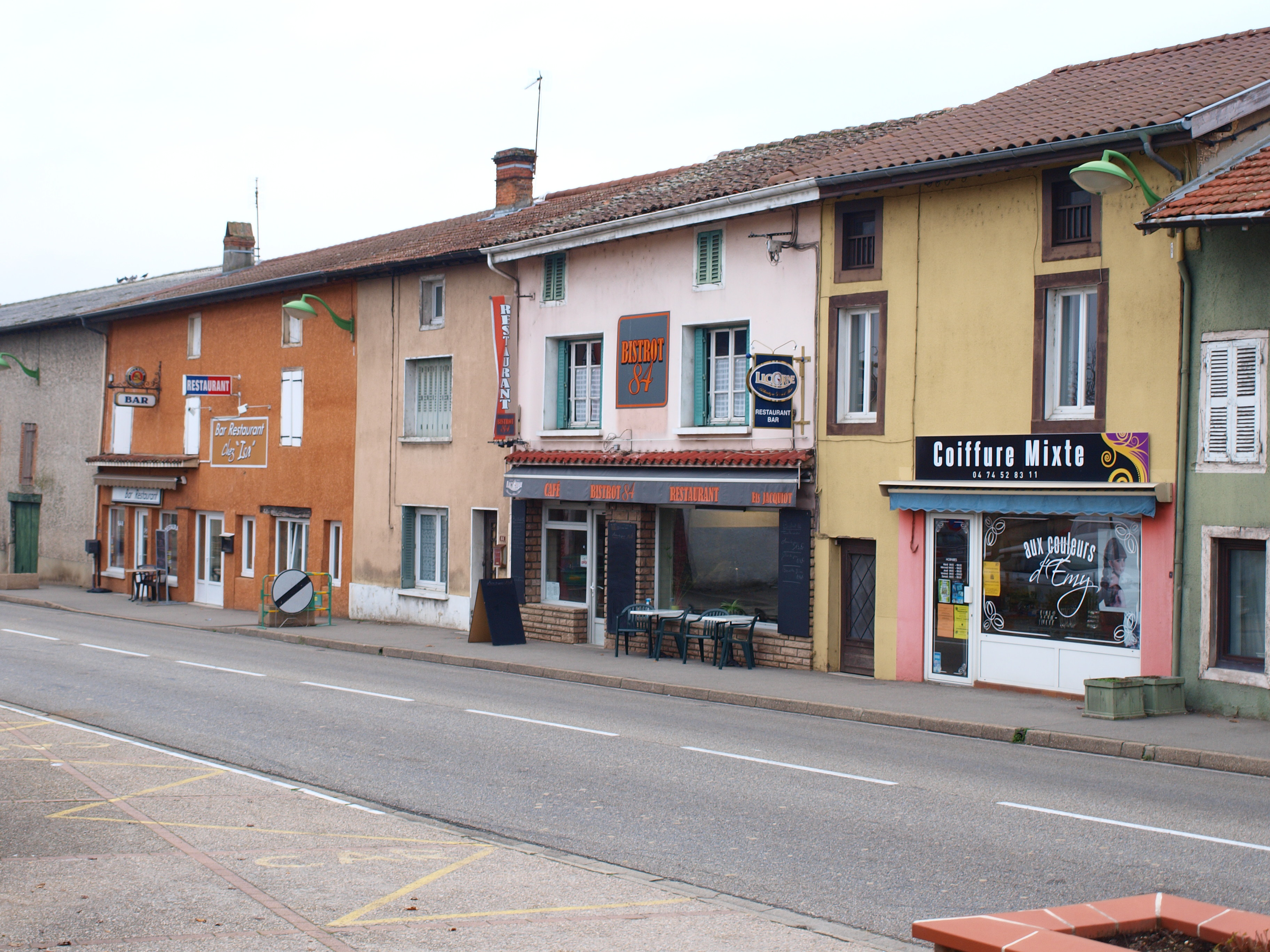 Servas (Ain, France) ; commerces